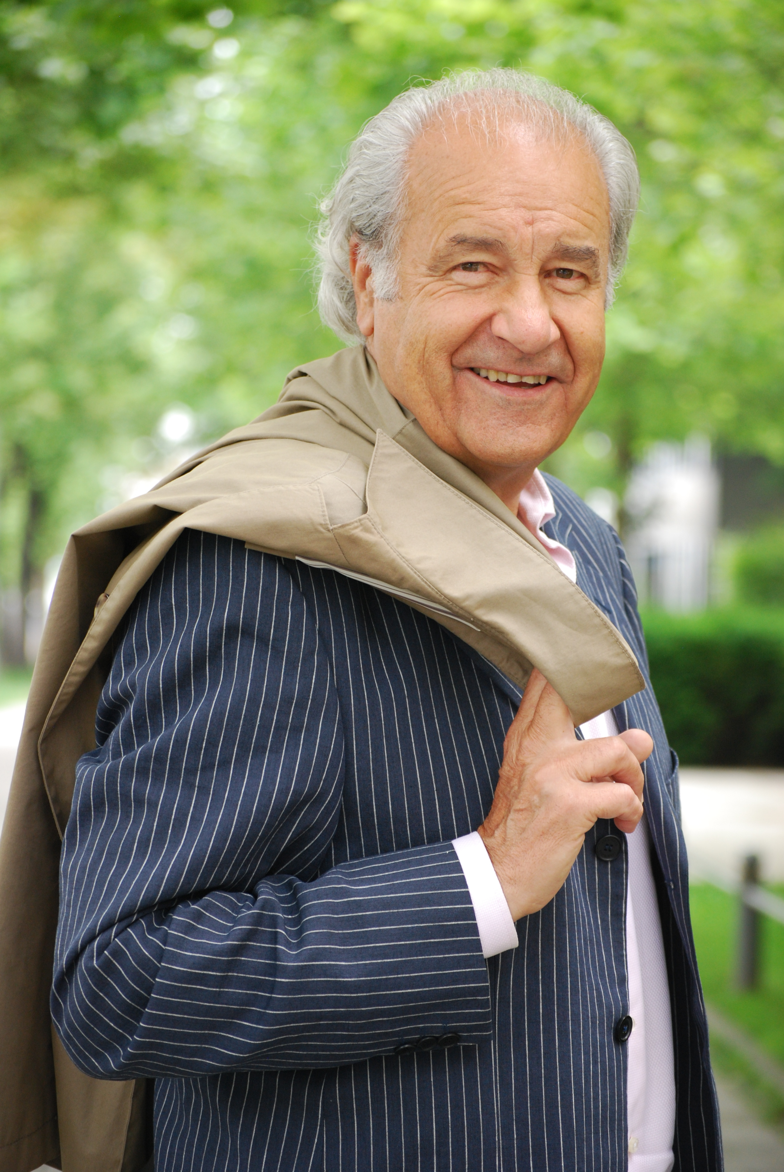 Manfred Schnelldorfer, Eiskunstäufer